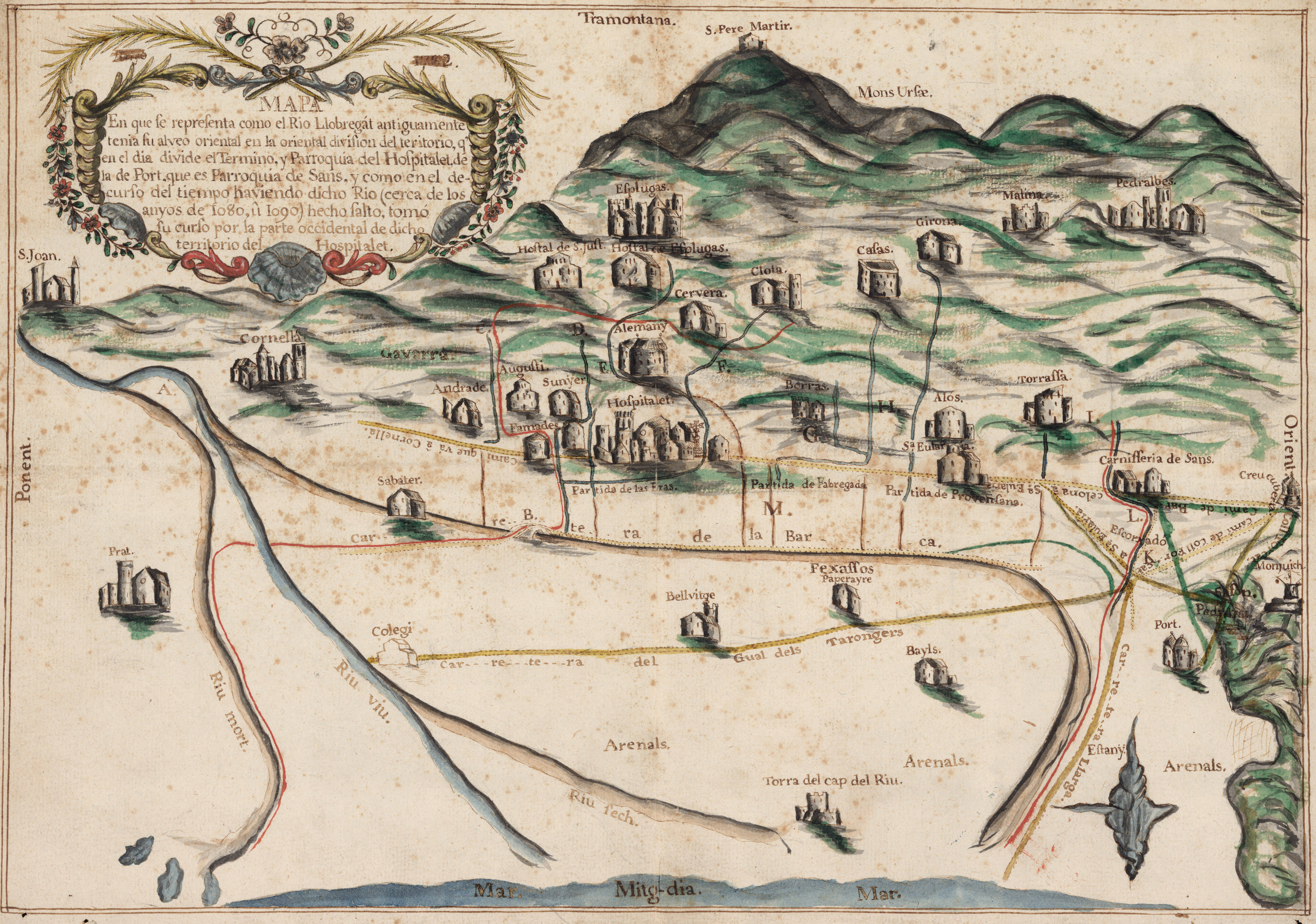 Mapa del curs baix del riu Llobregat, anònim de 1782, proveït per l'Ajuntament de l'Hospitalet de Llobregat i hostatjat per l'Institut Cartogràfic i Geològic de Catalunya